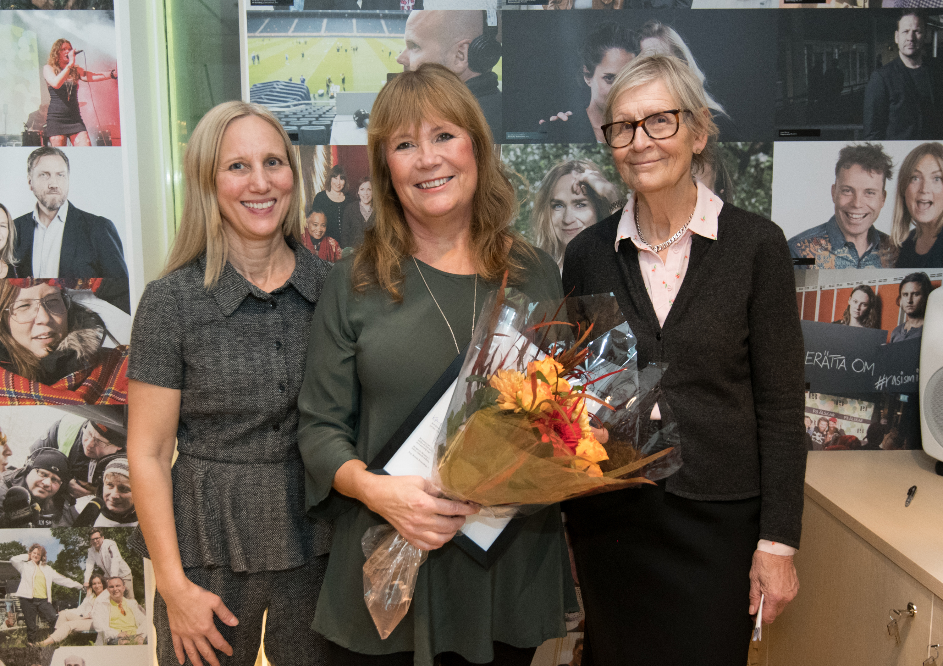 Mommapristagaren 2018 Annica Grimlund, i mitten, tillsammans med ordförande för Utgivarna, Viveka Hansson, och ordförande för juryn, Kerstin Brunnberg. Foto: Anette Persson